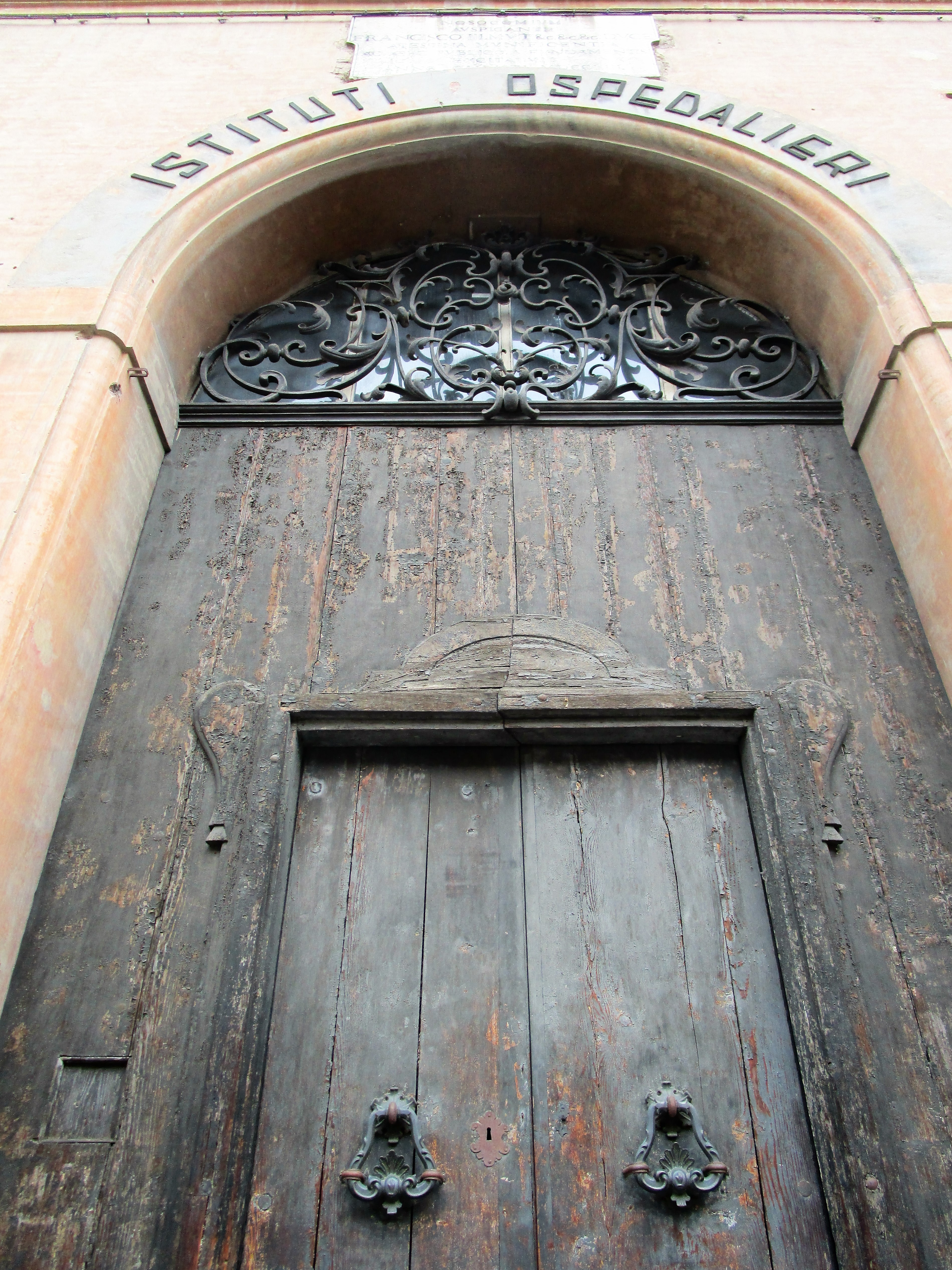 Ex Ospedale Sant'Agostino This is a photo of a monument which is part of cultural heritage of Italy.